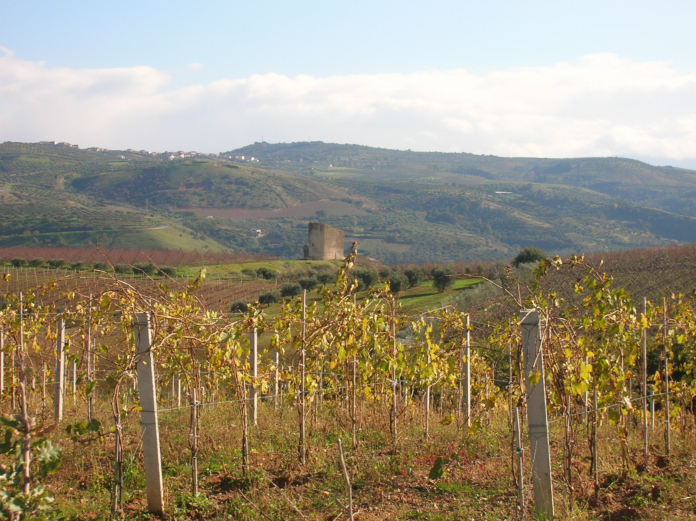 Panoramica di Fedula, frazione di San Lorenzo del Vallo